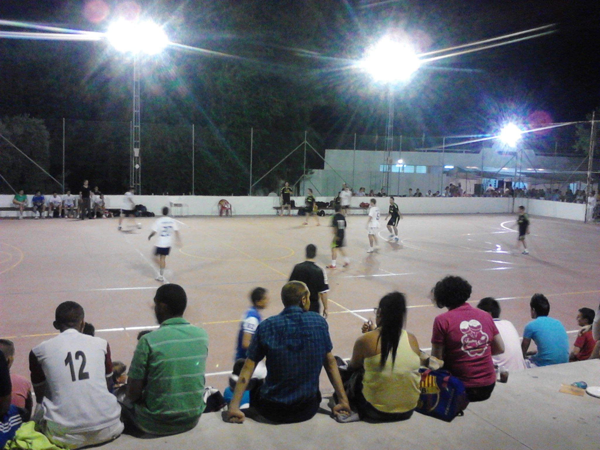 XXVIII Maratón de Fútbol Sala de Montalbán de Córdoba en el Polideportivo Municipal.